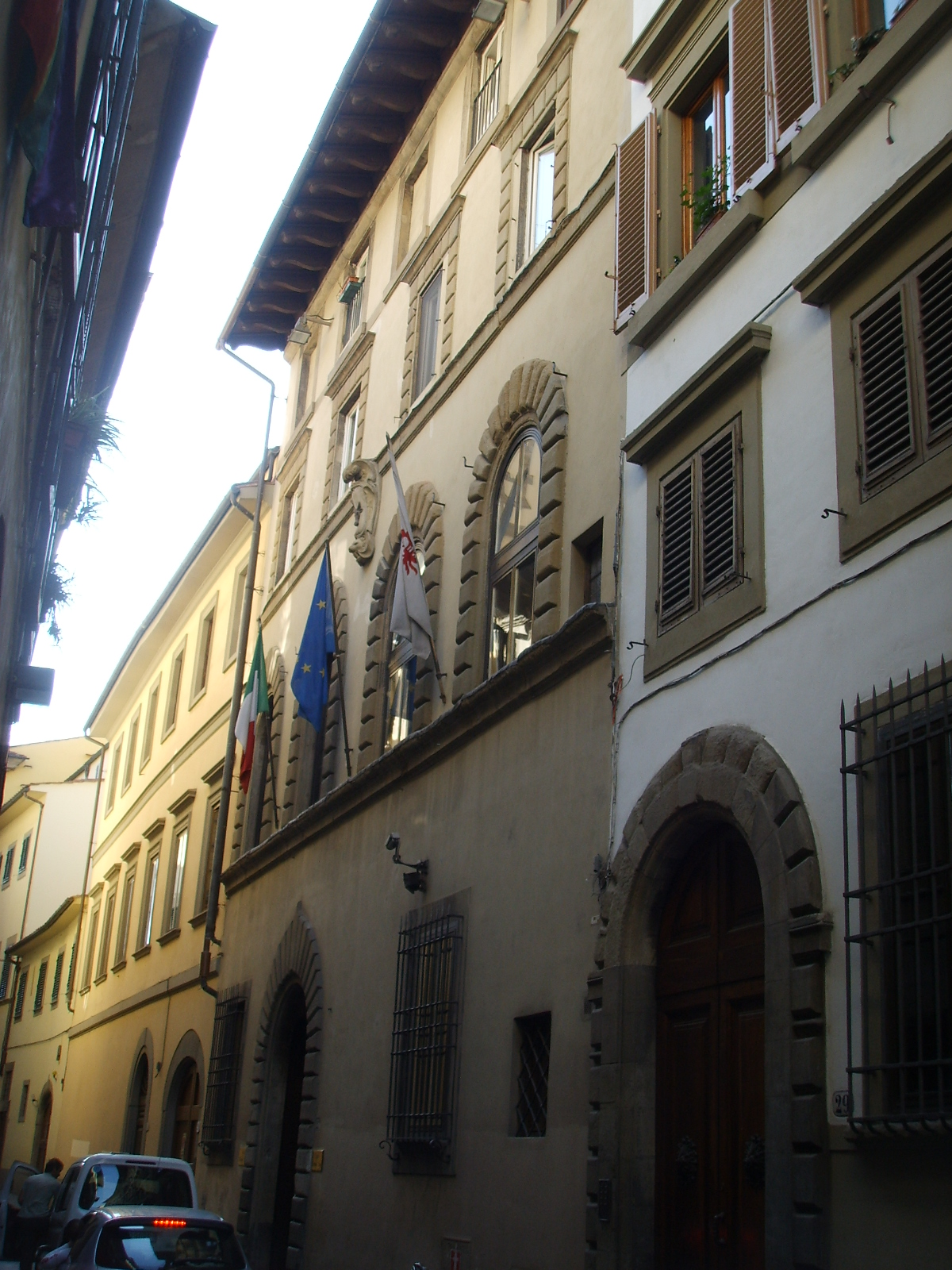 Palazzo_Marzichi_lenzi in Florence